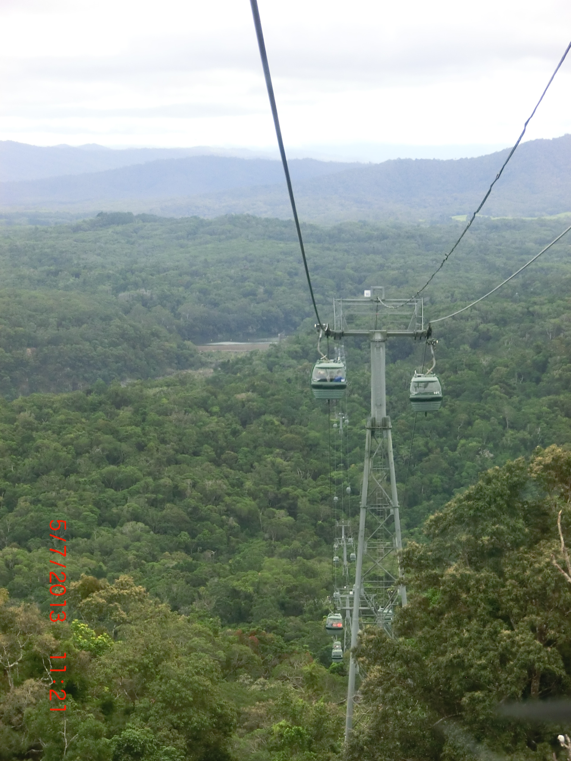 MacAlister Range QLD 4871, Australia